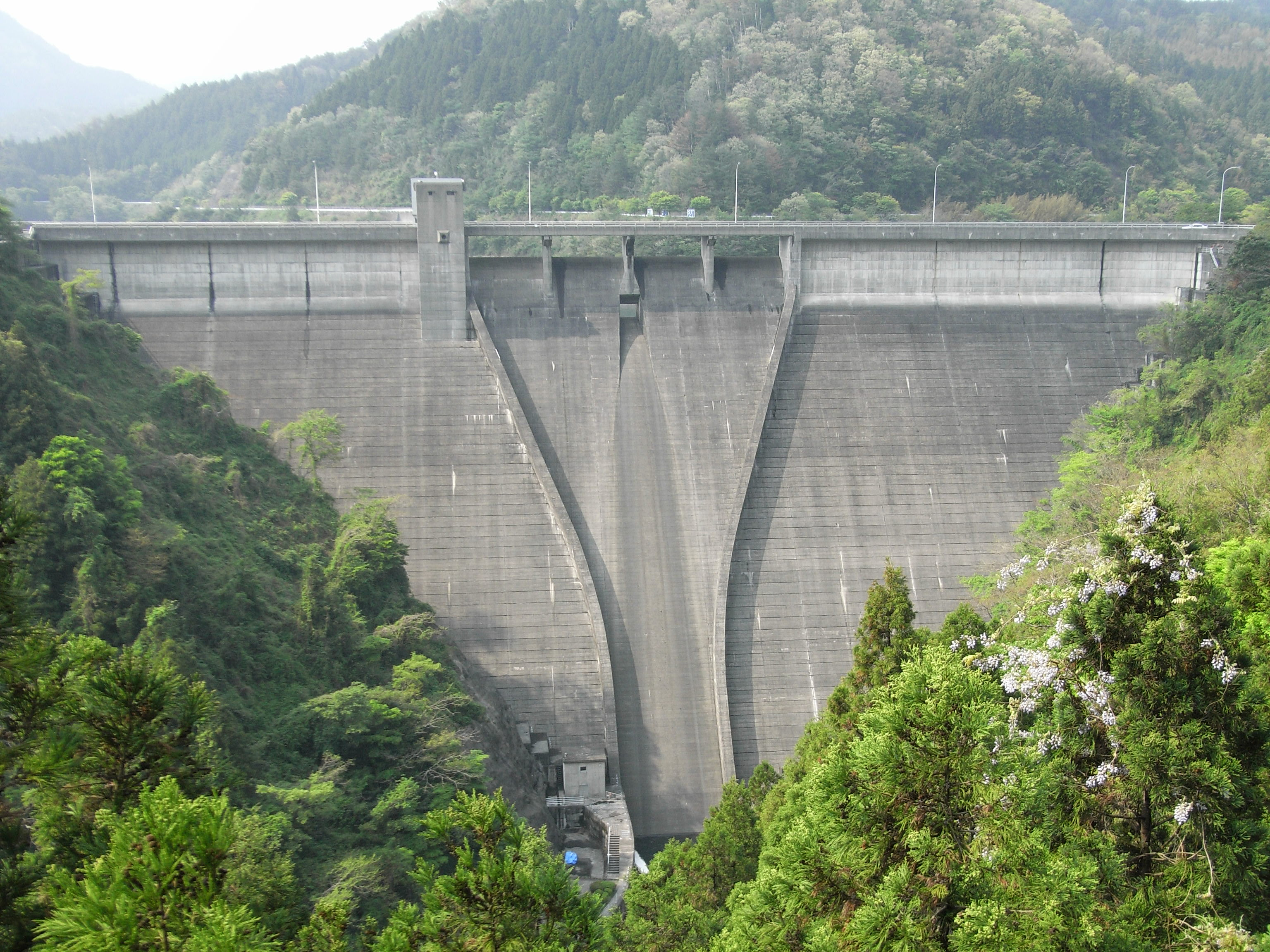 Dam